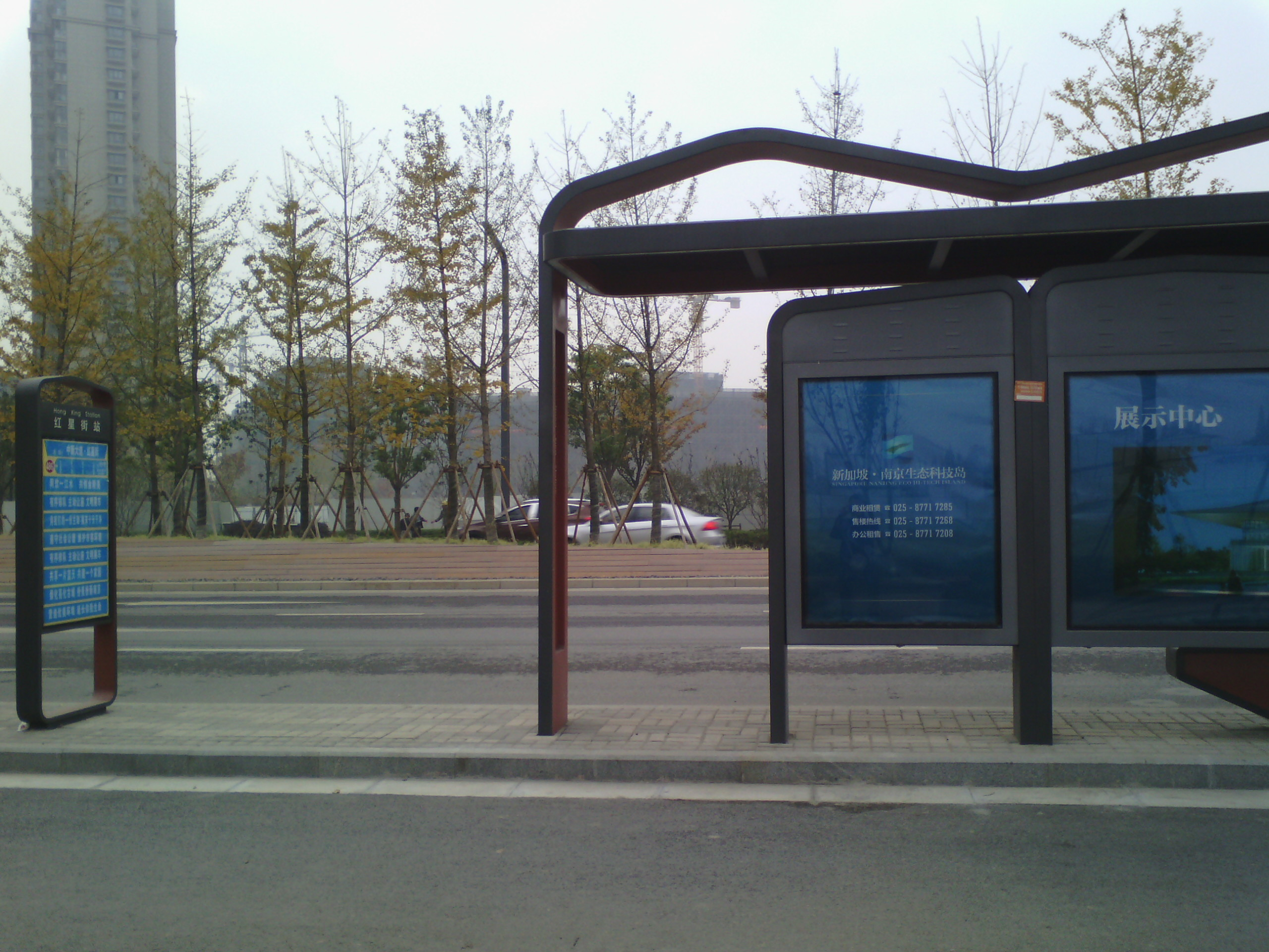 bus station in jiangxinzhou